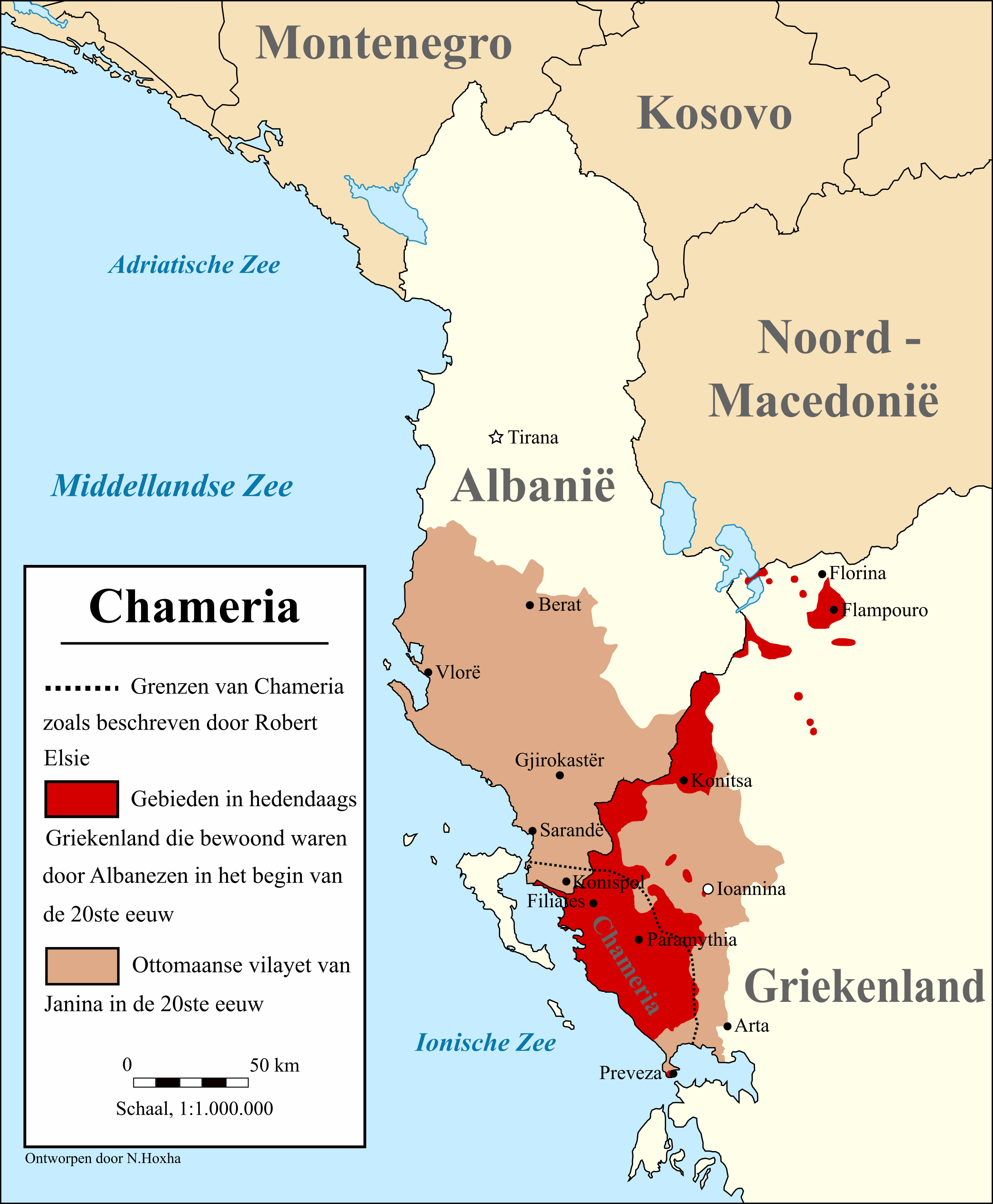 De kaart illustreert de grenzen van de historische regio Chameria zoals beschreven door Robert Elsie. De kaart toont ook het Ottomaanse vilayet van Janina en de gebieden in hedendaags Griekenland die bewoond waren door Albanezen in het begin van de 20e eeuw.